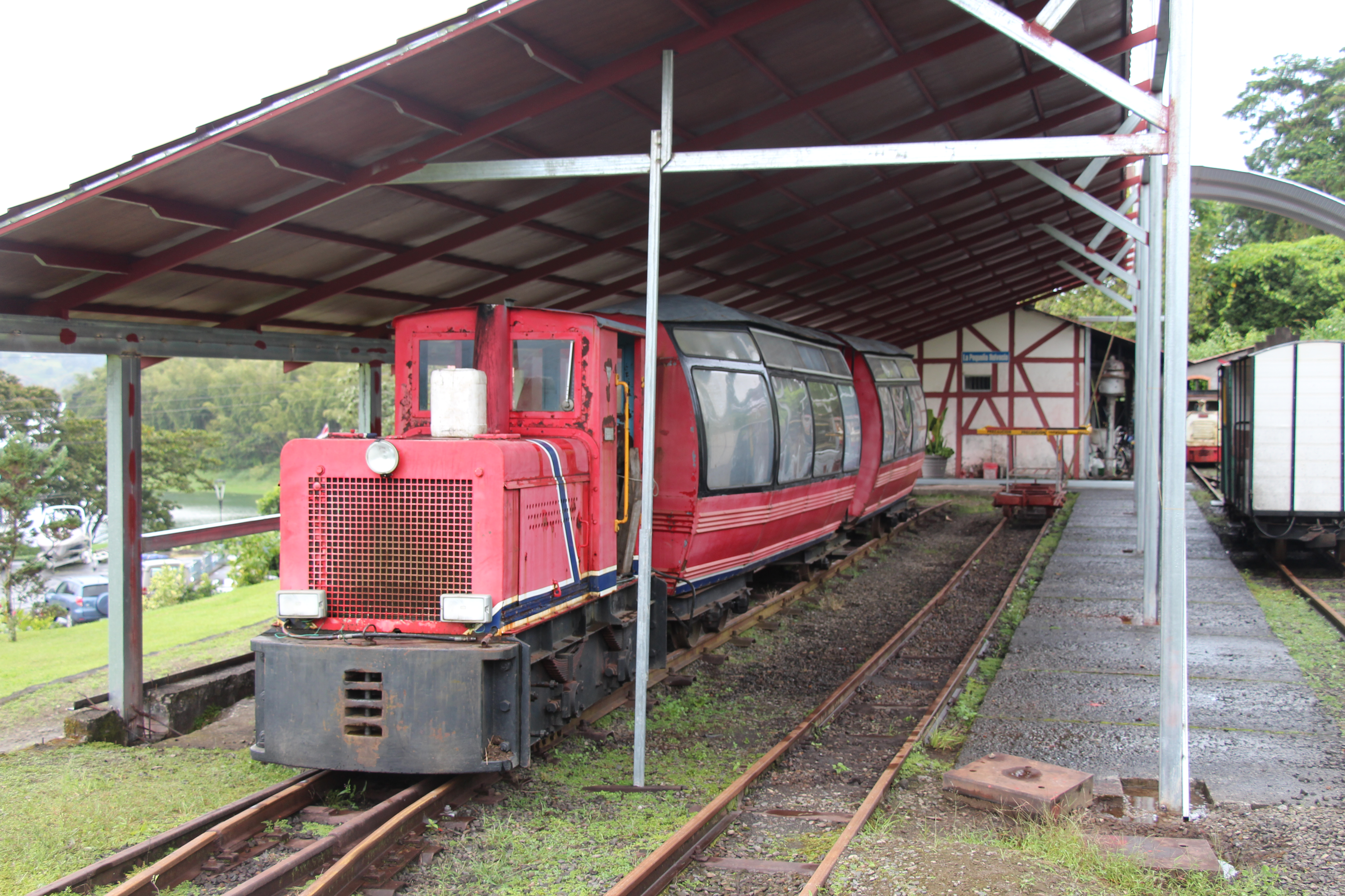 Talstation mit einer Komposition